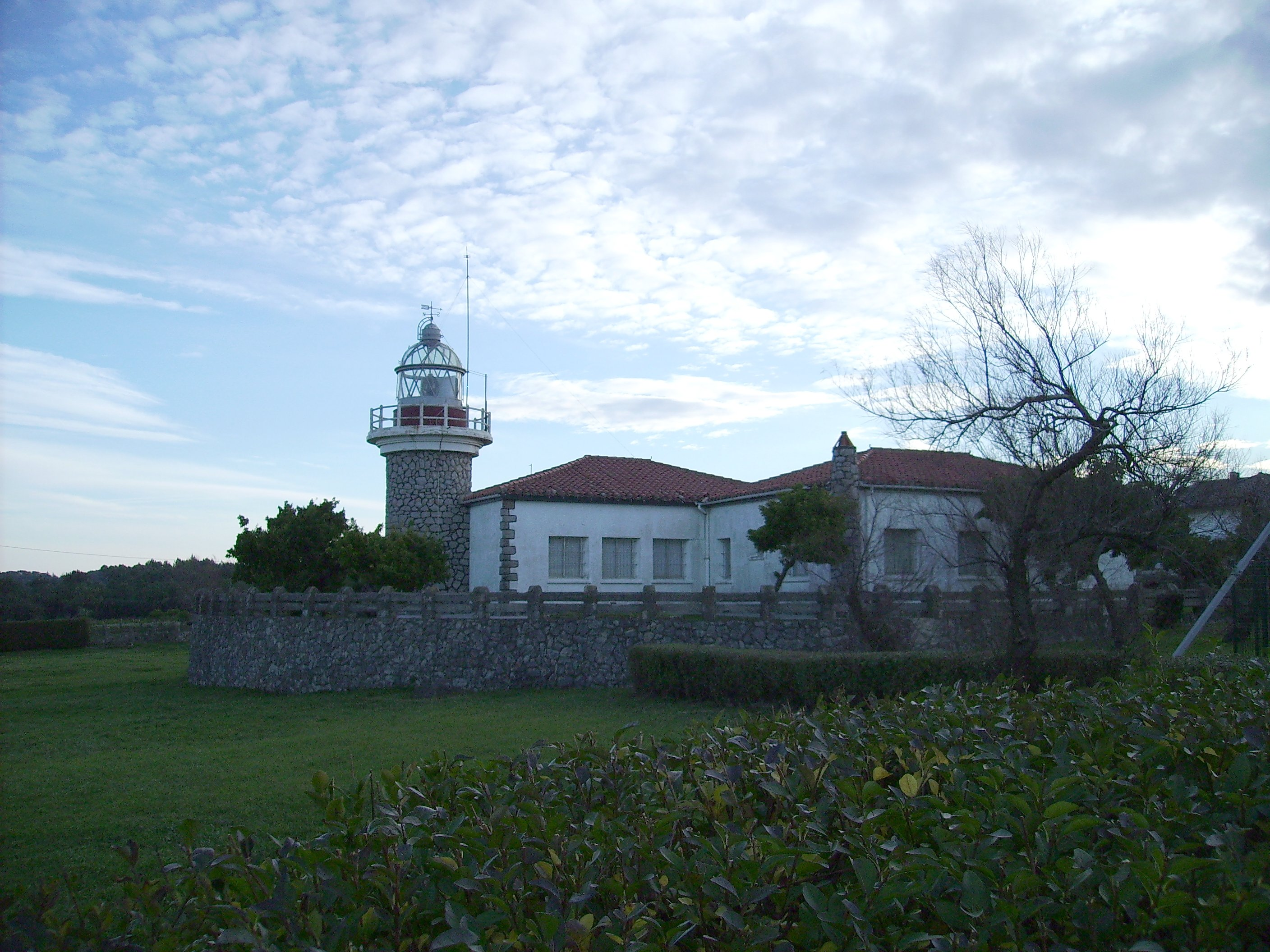 Galeako itsasargia